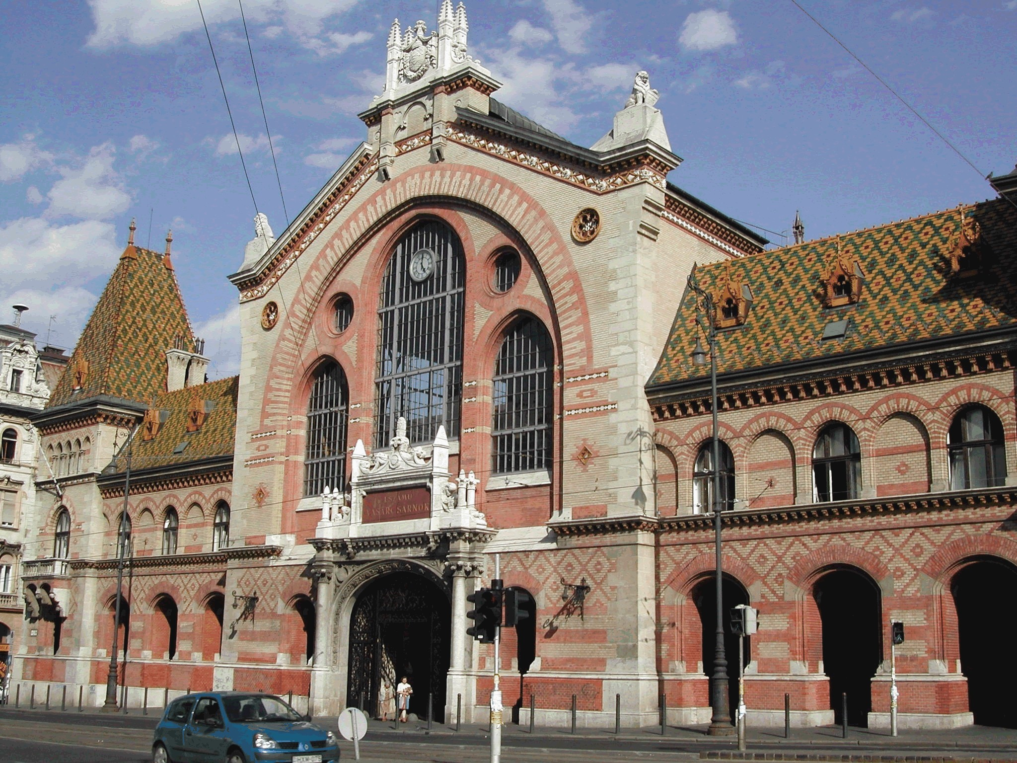 Budapest - Zentral Maarthal (Központi Vásárcsarnok).